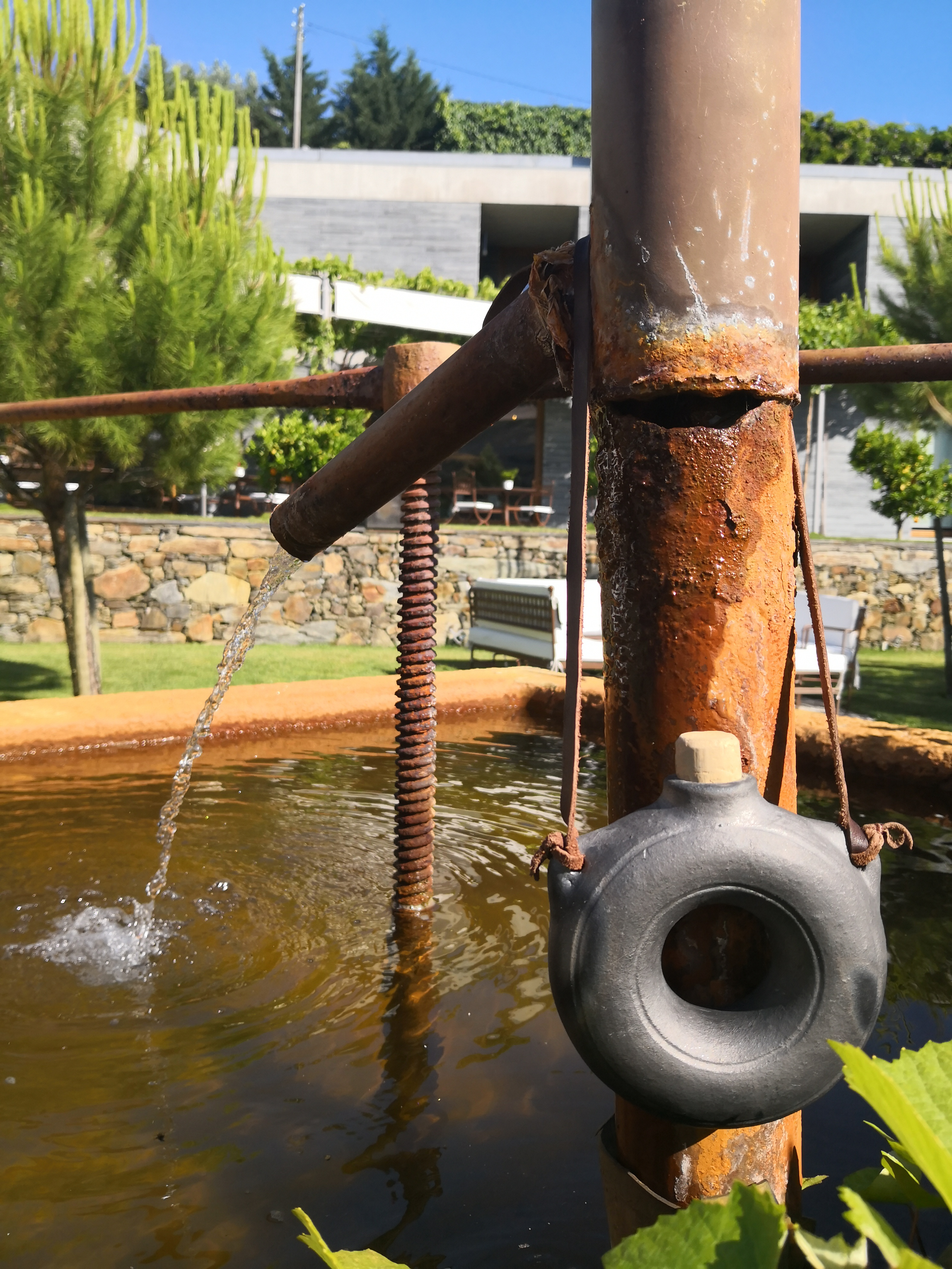 Cantil do Douro, peça criada pelo oleiro Jorge Ramalho. Foto tirada na Quinta do Vallado